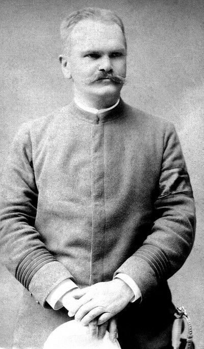 Emil Körner Henze (* Halle an der Saale, Prusia, 1846 - † Berlín, Alemania, 25 de marzo de 1920). Militar Alemán. Heredero de una larga tradición militar prusiana, fue Comandante del Ejército de Chile con el grado de Inspector General desde 1900 a 1910. La foto le muestra durante la guerra civil como jefe de estado mayor del bando congresista.